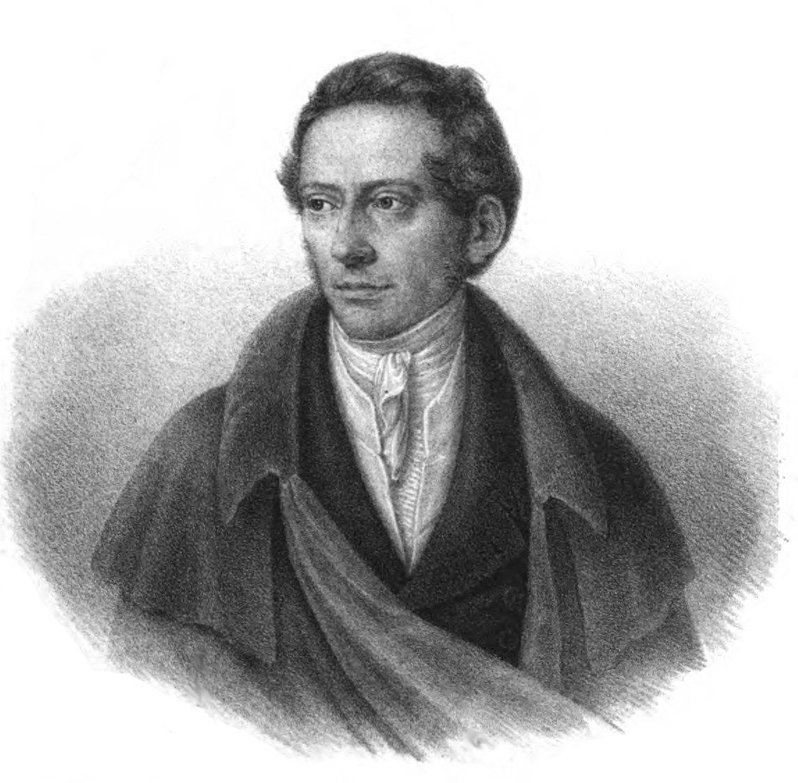 Autorenbild